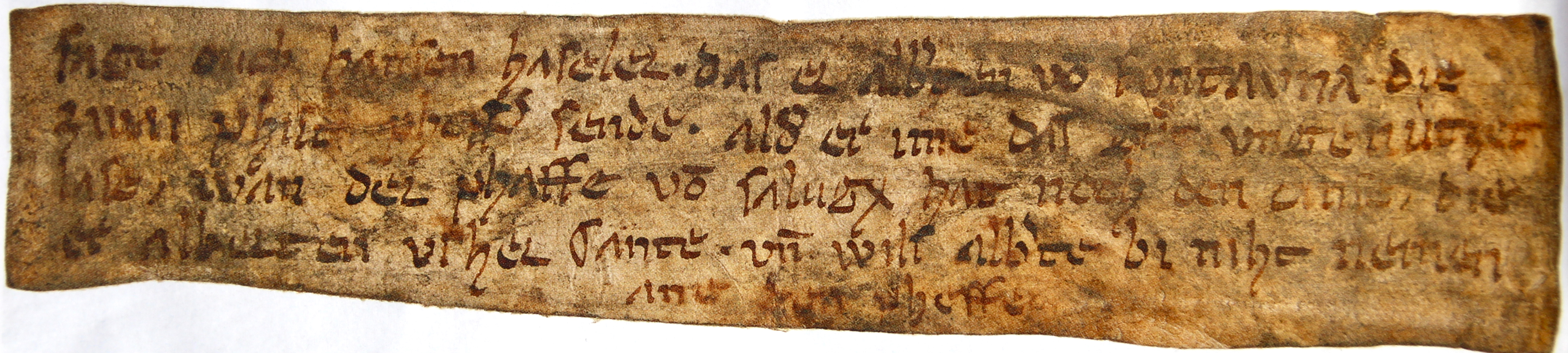 Pergamentzettelchen aus der ersten Hälfte des 14. Jahrhunderts aus der Burg Marmels, gefunden 1987